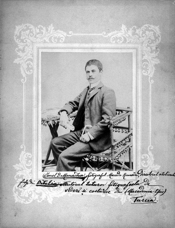 Янаки Манаки